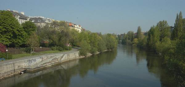 Donaukanal oberhalb der Rotundenbrücke